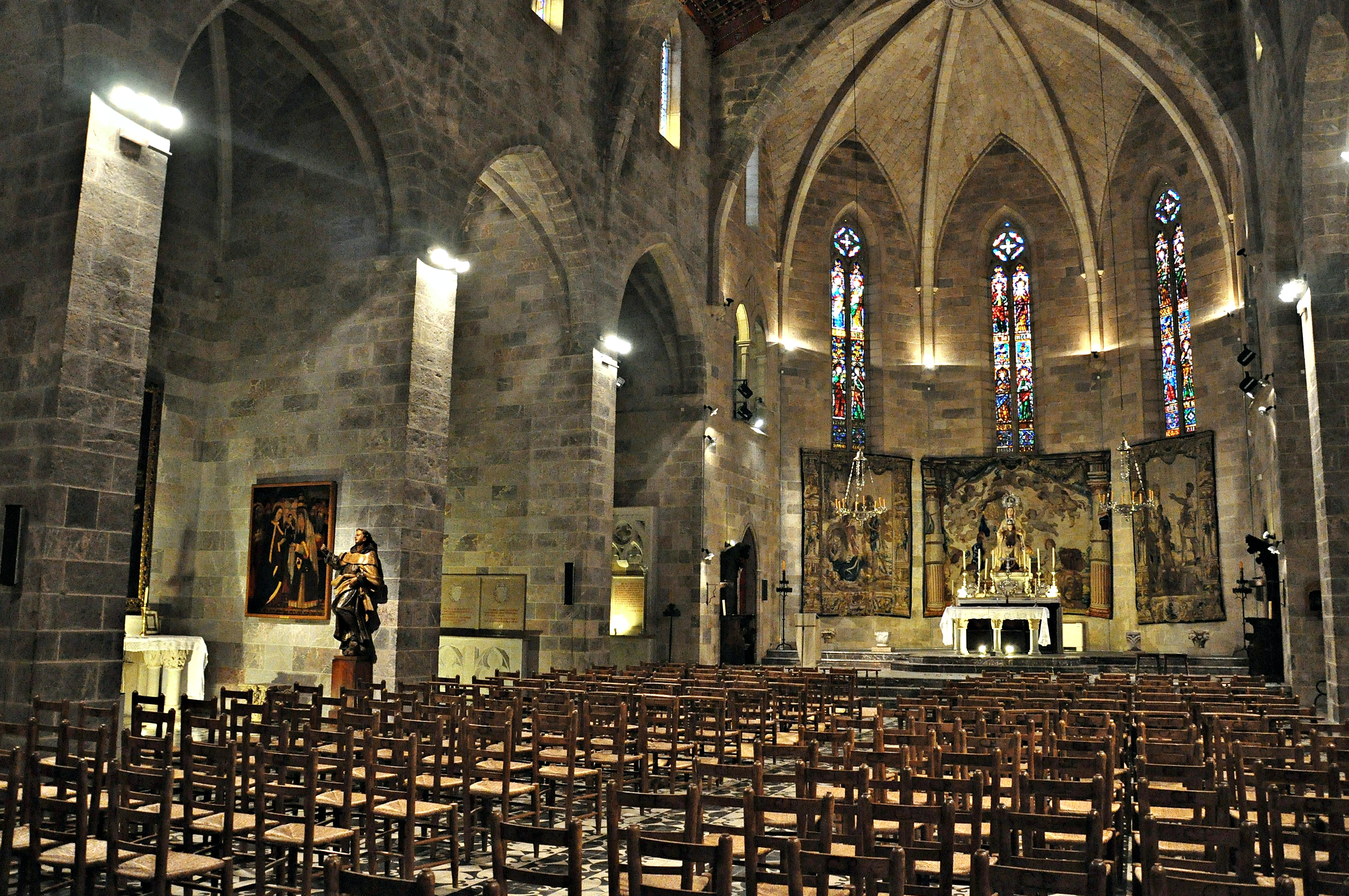 alt emporda-cataluña